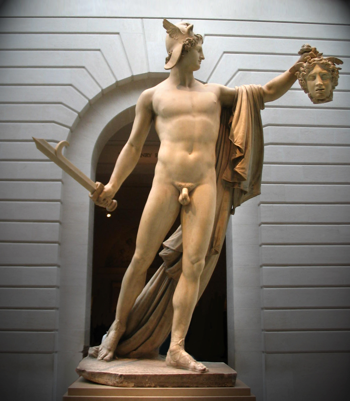 Perseus